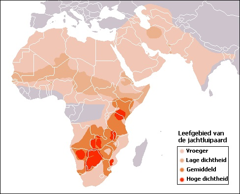 Verspreiding jachtluipaard (Acinonyx jubatus)